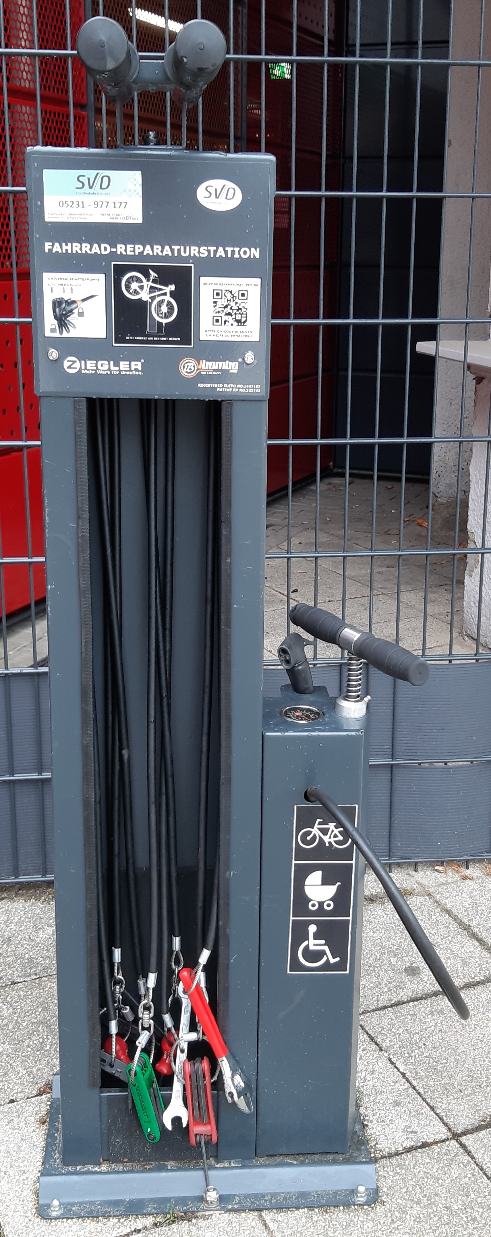 Fahrradreparaturstation